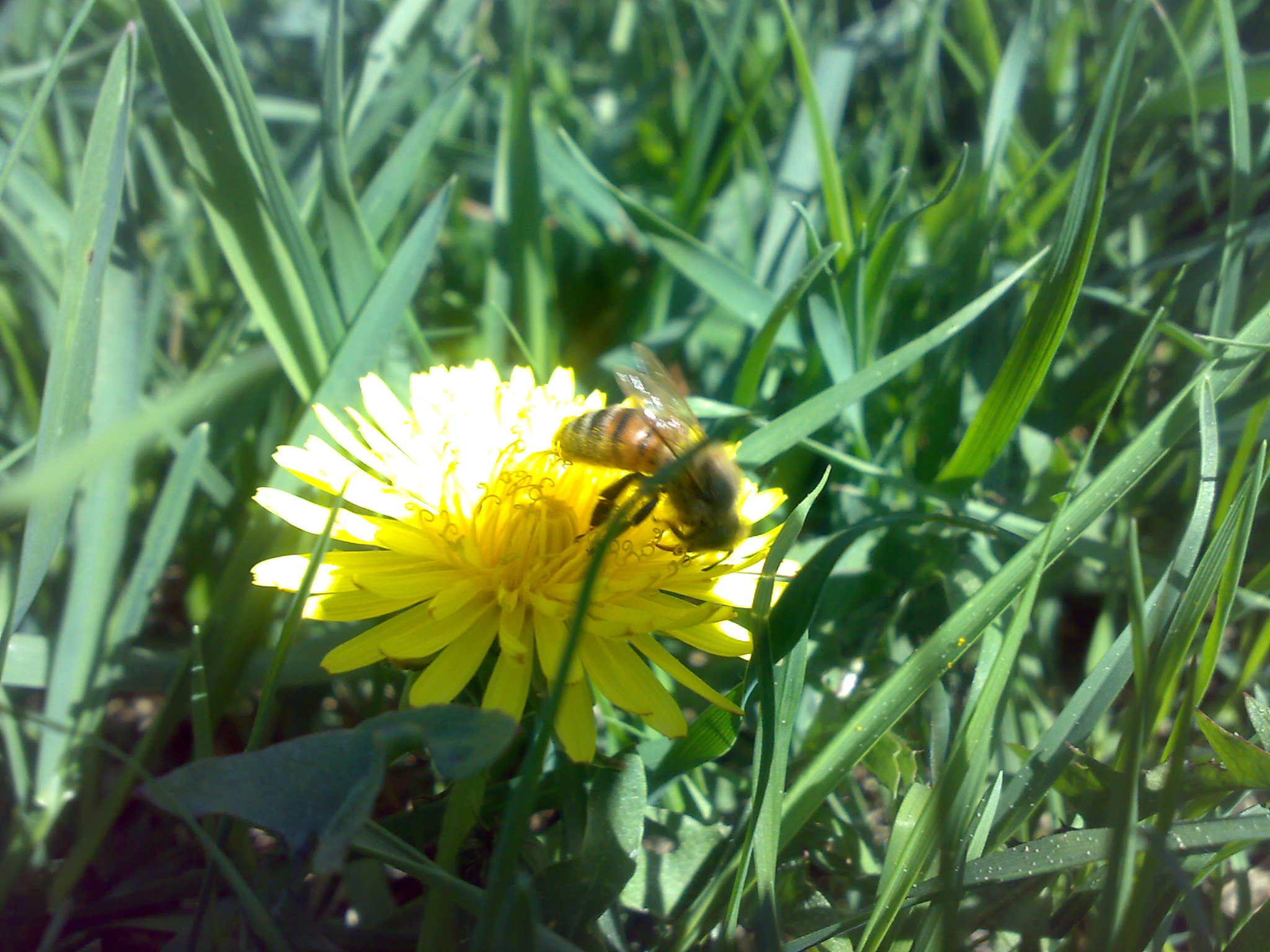 Honningbie Apis mellifera Norway